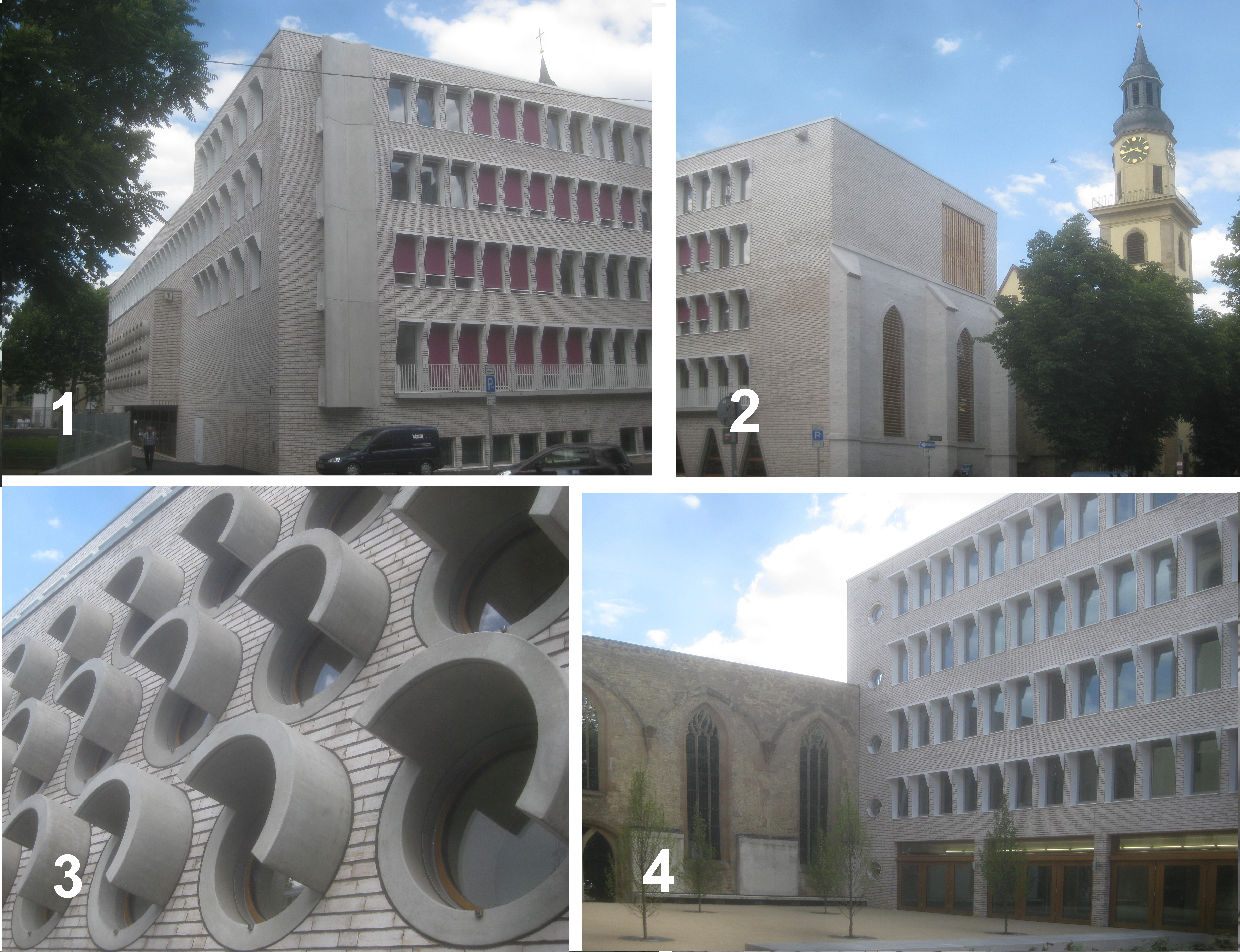 Neuer Hospitalhofs in Stuttgart, 2014. – 1 Ansicht von der Gymnasiumstraße, 2 Ansicht von der Büchsenstraße, 3 Ansicht des Innenhofs, links: Südwand der Hospitalkirche, 4 Bullaugenfenster.